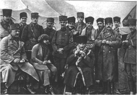 8 Şubat 1923'te Kâzım Karabekir, Latife Hanım ve Mustafa Kemal Atatürk Edremit yolu üzerindeki Ergama köyünde.